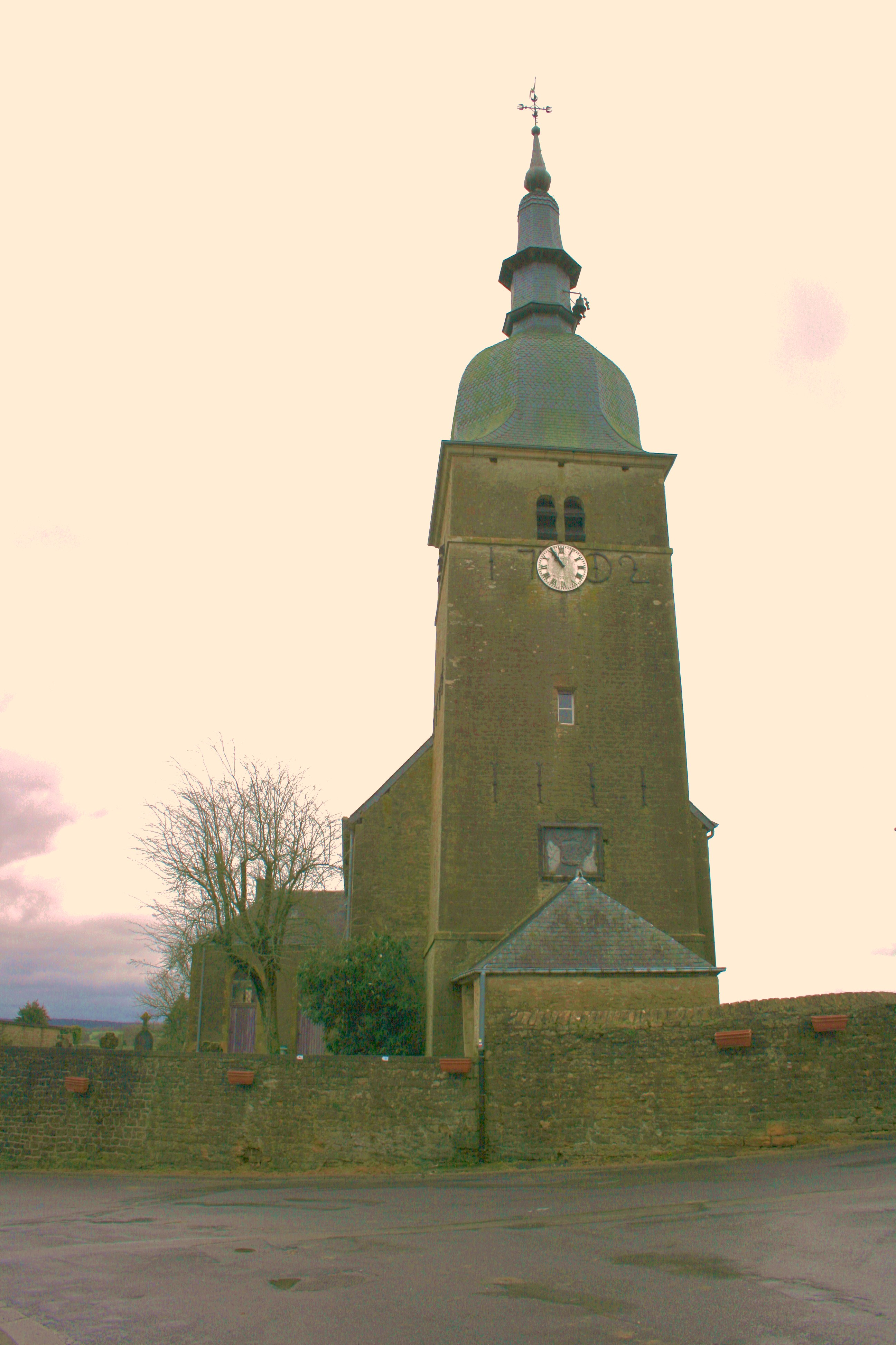 Chassepierre. Église Saint-Martin. Façade principale.